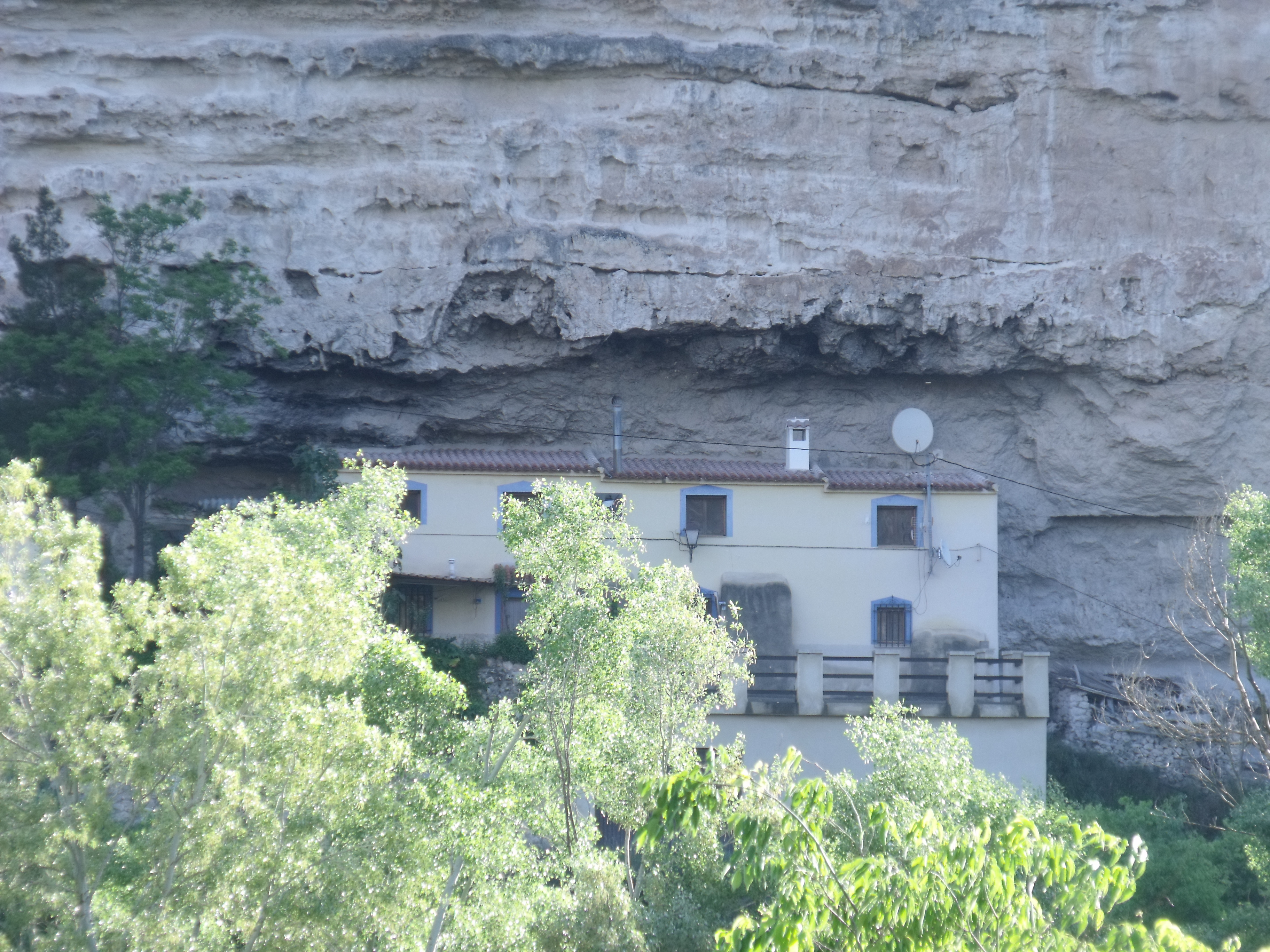 Vistas de Maldonado